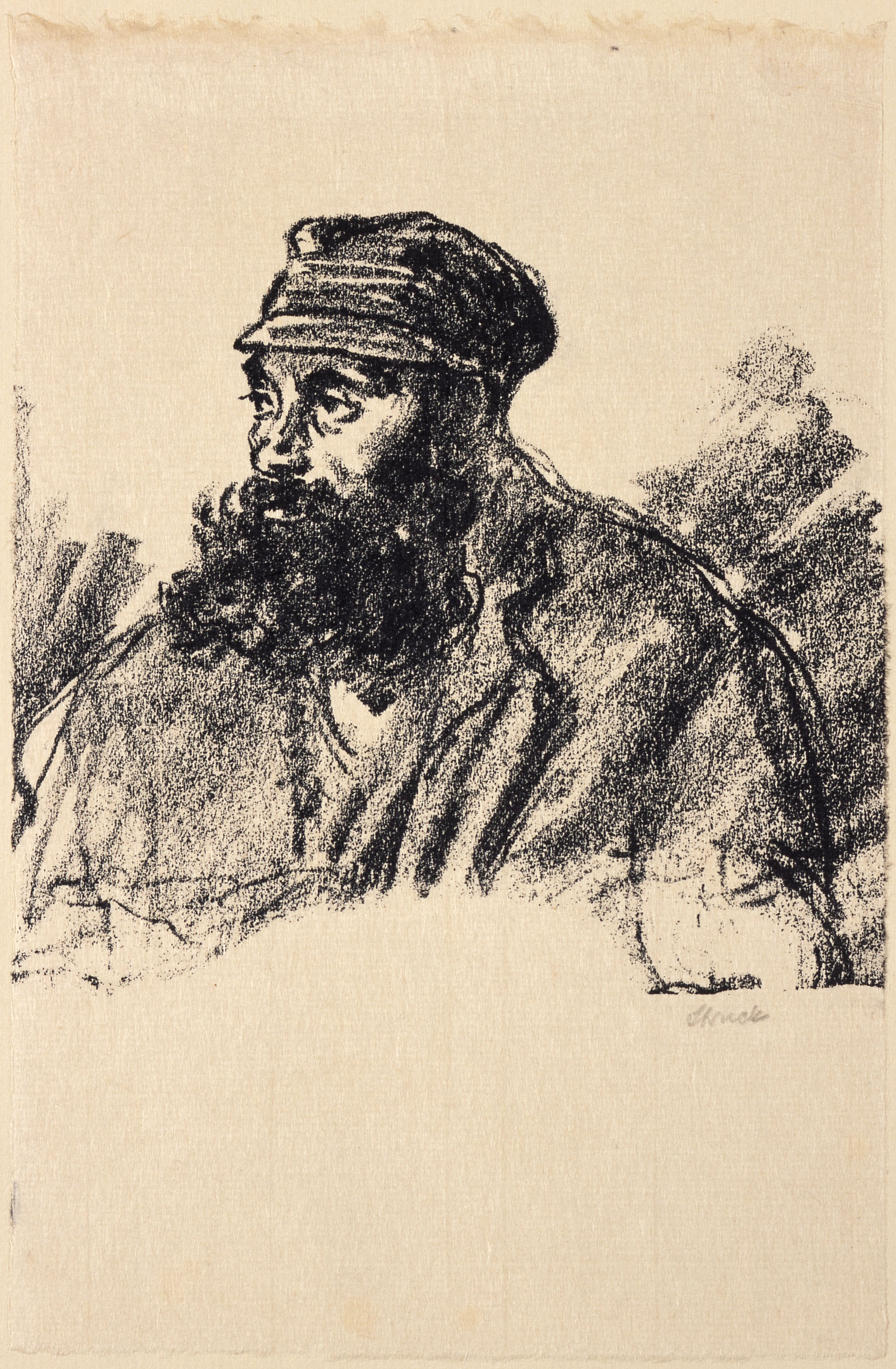 Artwork by Hermann StruckDargestellte Person: Oberbefehlshaber Ost, DNB-LinkDatierung Display: ca. 1916Bezug: Aus der Mappe "Skizzen aus Russland. Ostjuden"Objektart: LithografieSchlagworte Inhalt /Geografie: Berlin, Ostjuden, Ostjude (Darstellungstradition), Bialystok, Mann, PorträtSchlagworte Kontext: Weltkrieg (1914-1918), Jüdische Renaissance, Wehrdienst